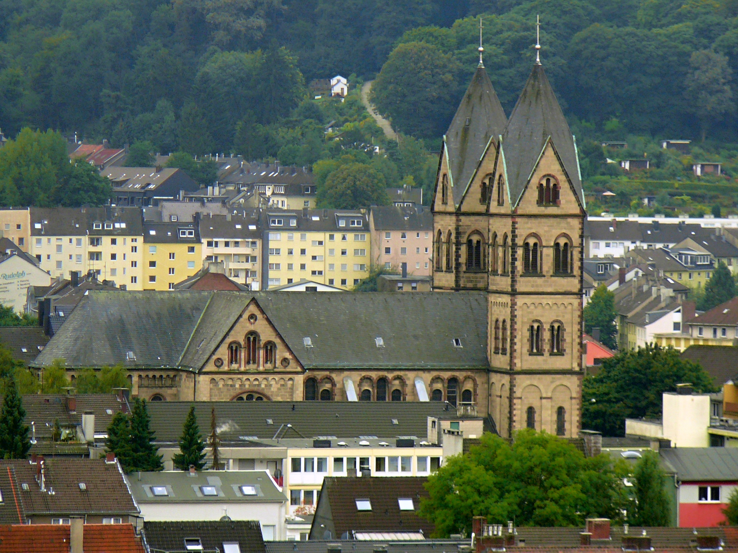 Blick vom Sparkassenturm, IslanduferThis is a photograph of an architectural monument. 3401